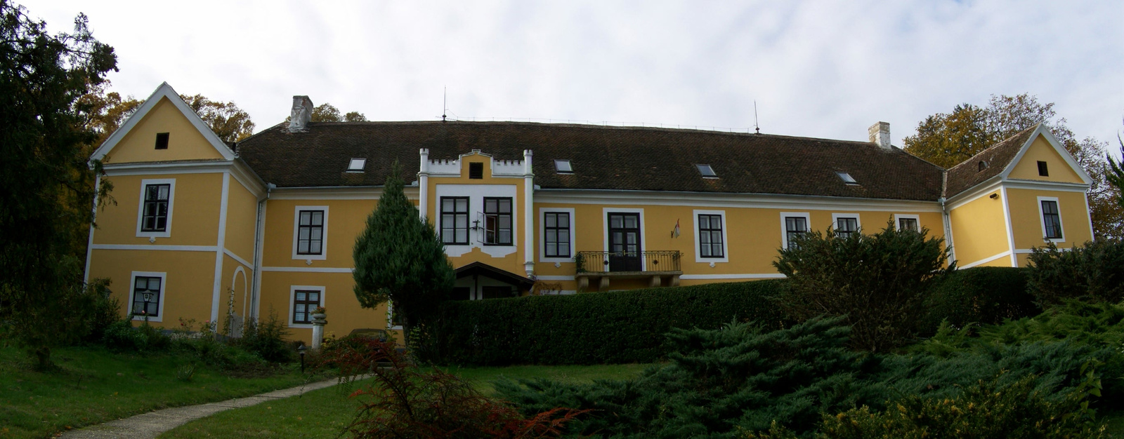 v. Felsőbüki Nagy-kastély (Sitke, József Attilla utca 1.) This is a photo of a monument in Hungary, Identifier: 9318